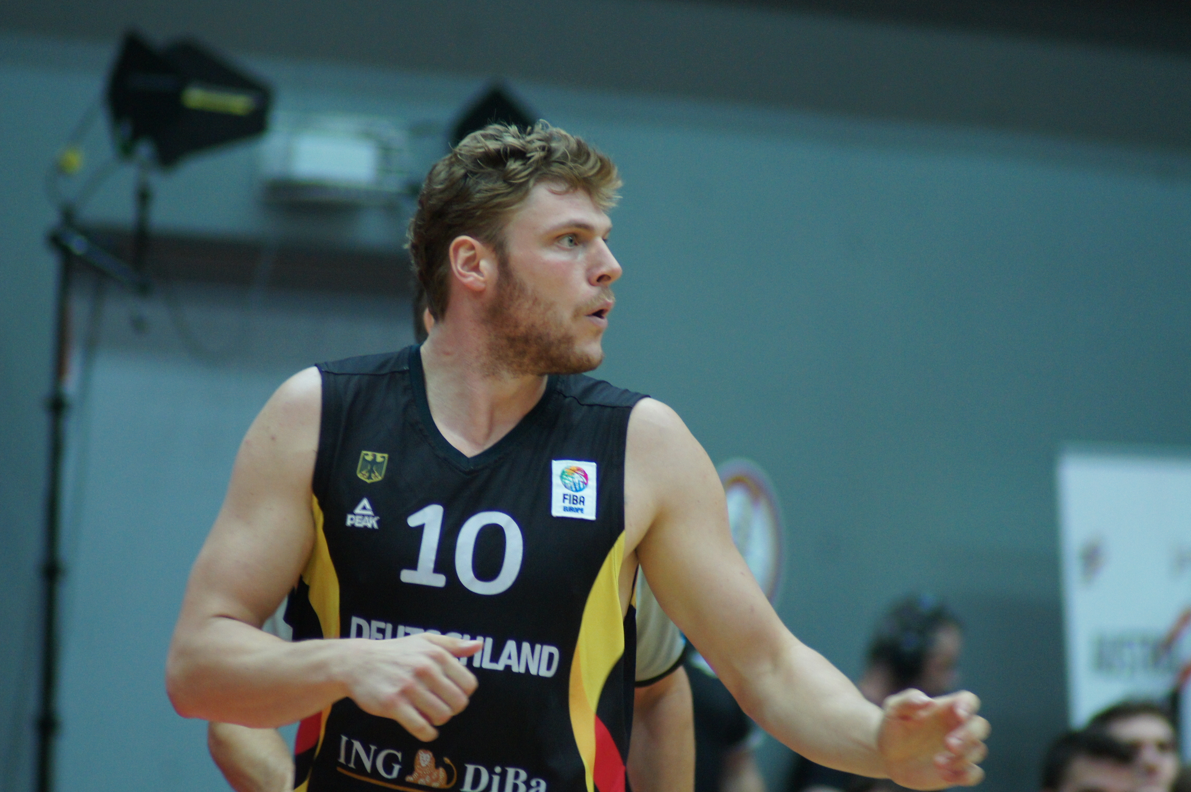 Qualifikationsspiel EuroBasket Österreich - Deutschland, 13. August 2014 im Multiversum Schwechat.